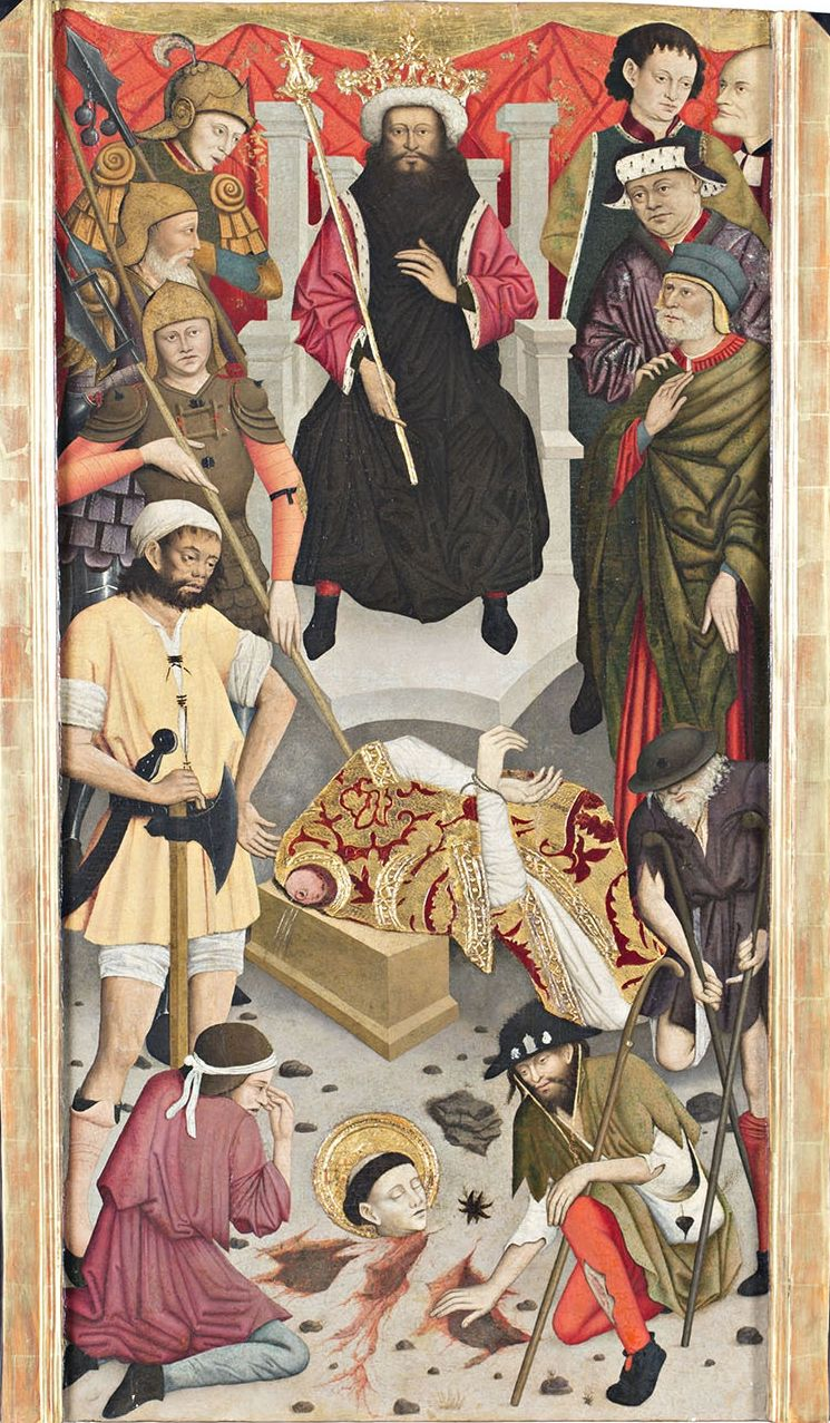 Taula de la Decapitació de Sant Baldiri, obra de Lluís Dalmau de 1448. Va pertànyer al retaule de l'església de sant Baldiri de Sant Boi de Llobregat. El 31 de maig de 2017 va ser adquirida pel MNAC a una col·lecció particular.